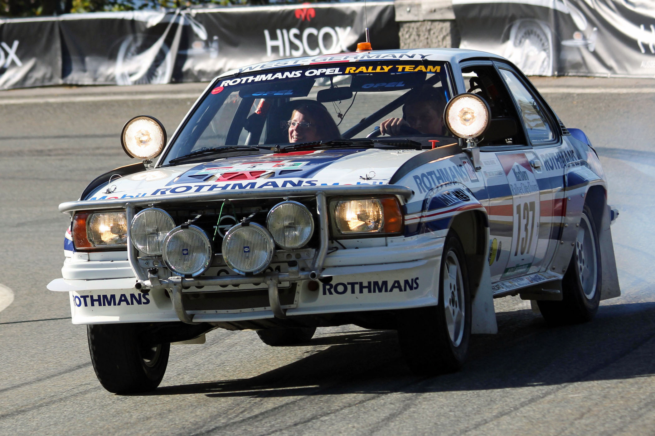 Röhrls Opel Ascona 400 - Rallye-WM 1982